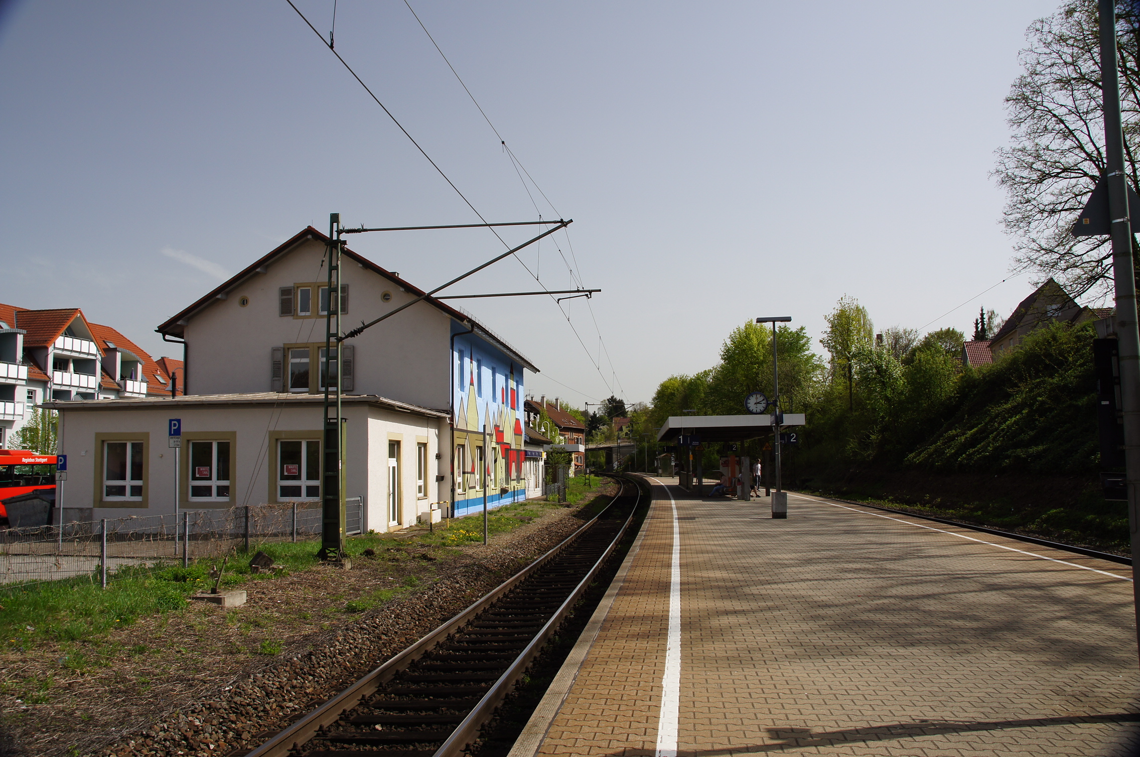 Bahnhof Besigheim